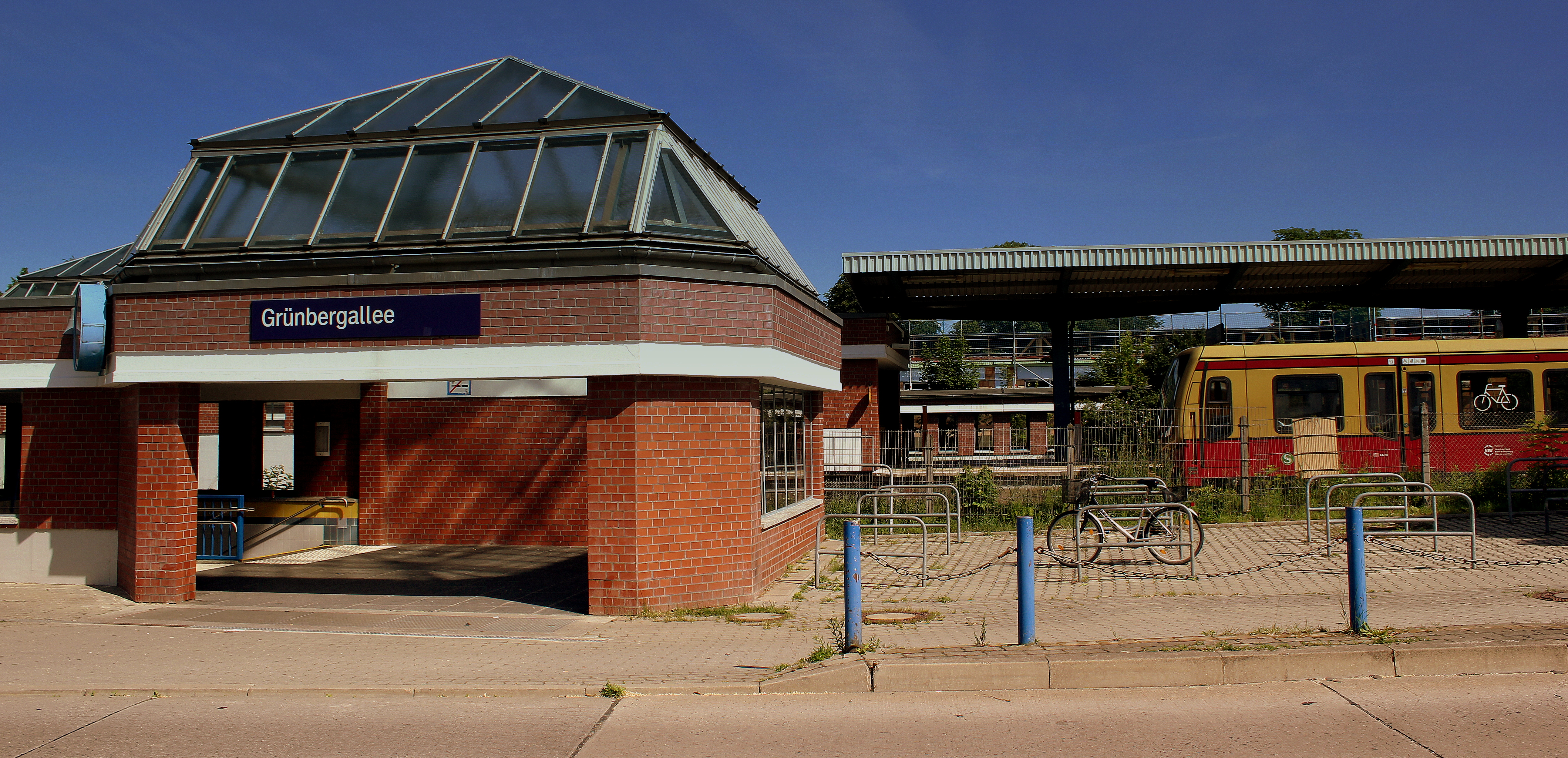 GRUNBERGERALLEE S BAHN STATION BERLIN GERMANY JUNE 2013